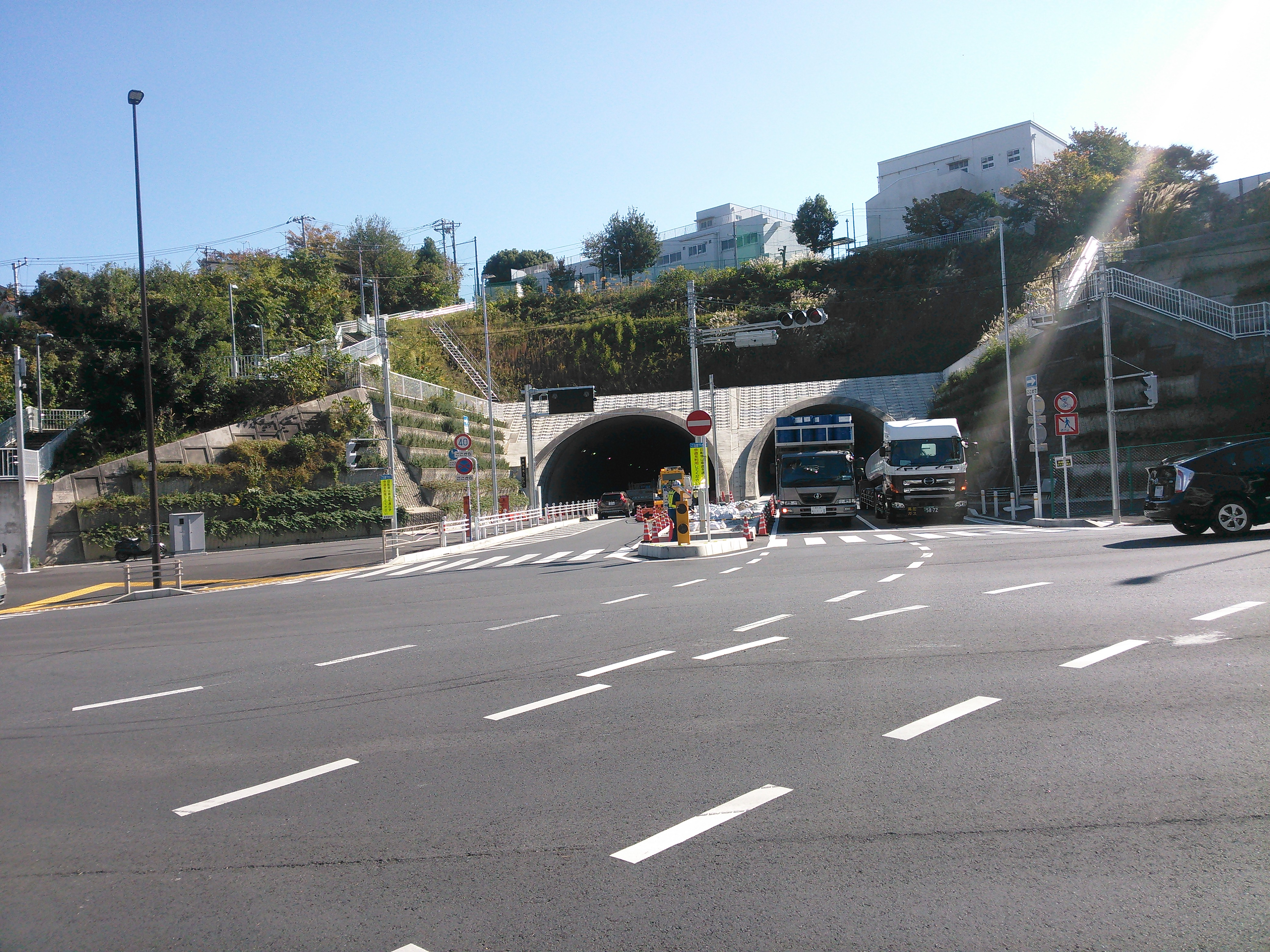 横浜市鶴見区、第二京浜国道と接続する岸谷生麦線の起点。奥が岸谷生麦トンネルを経由して生麦方面。手前右が第二京浜青木橋方面、左は同五反田方面。